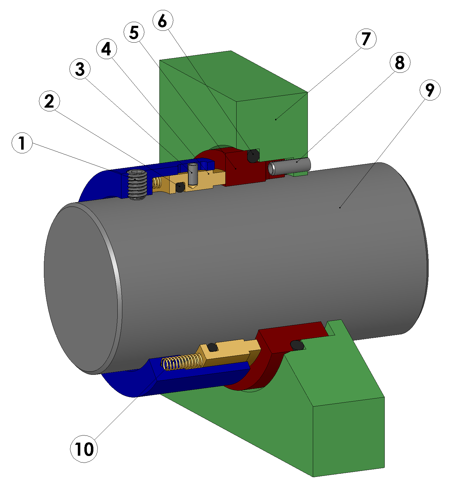 Schnitt durch eine drehrichtungsunabhaengige, einfachwirkende Gleitringdichtung mit Positionsnummern. 1) Gewindestift 2) O-Ring (Sekundaerdichtung) 3) Spannstift als Verdrehsicherung fuer den Gleitring (4) 4) Gleitring 5) Gegenring 6) O-Ring (Sekundaerdichtung) 7) Gehaeusewand (nur angedeutet) 8) Spannstift als Verdrehsicherung fuer den Gegenring (5) 9) Welle/Achse 10) Federn